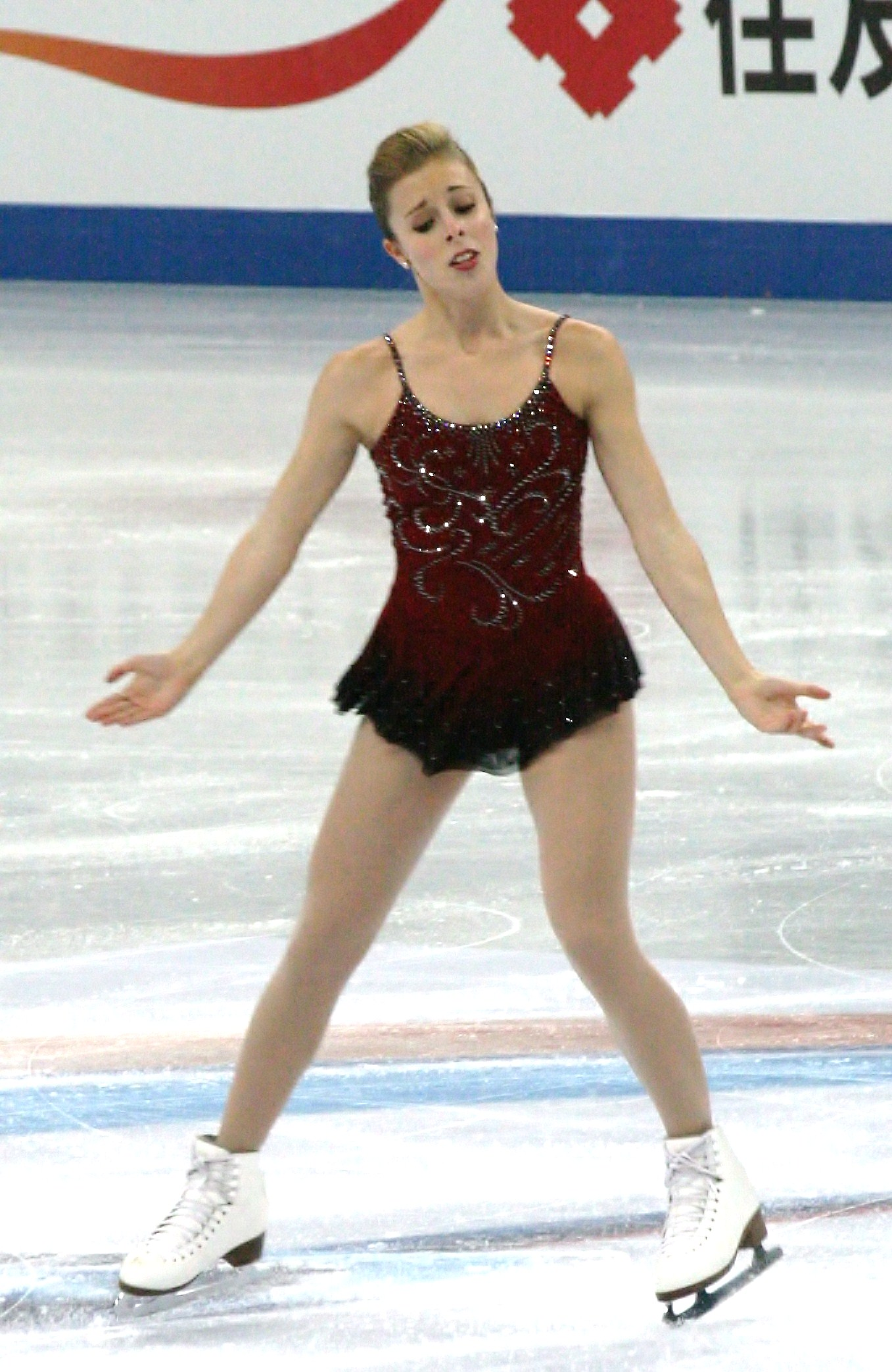 Эшли Вагнер (США) на финале Гран-при 2012-2013. Короткая программа.